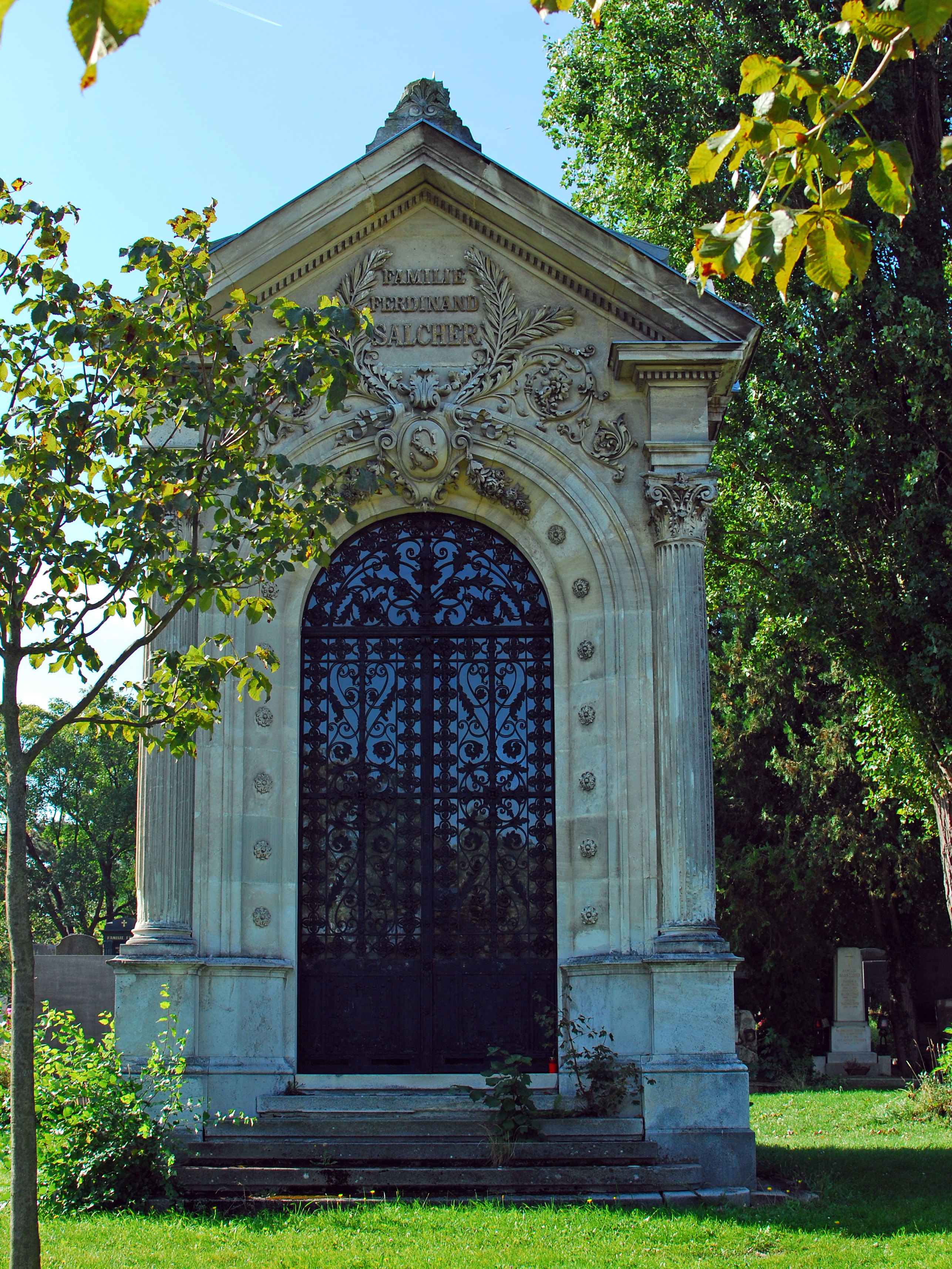 Friedhof Mauer, Mausoleum der Familie Salcher